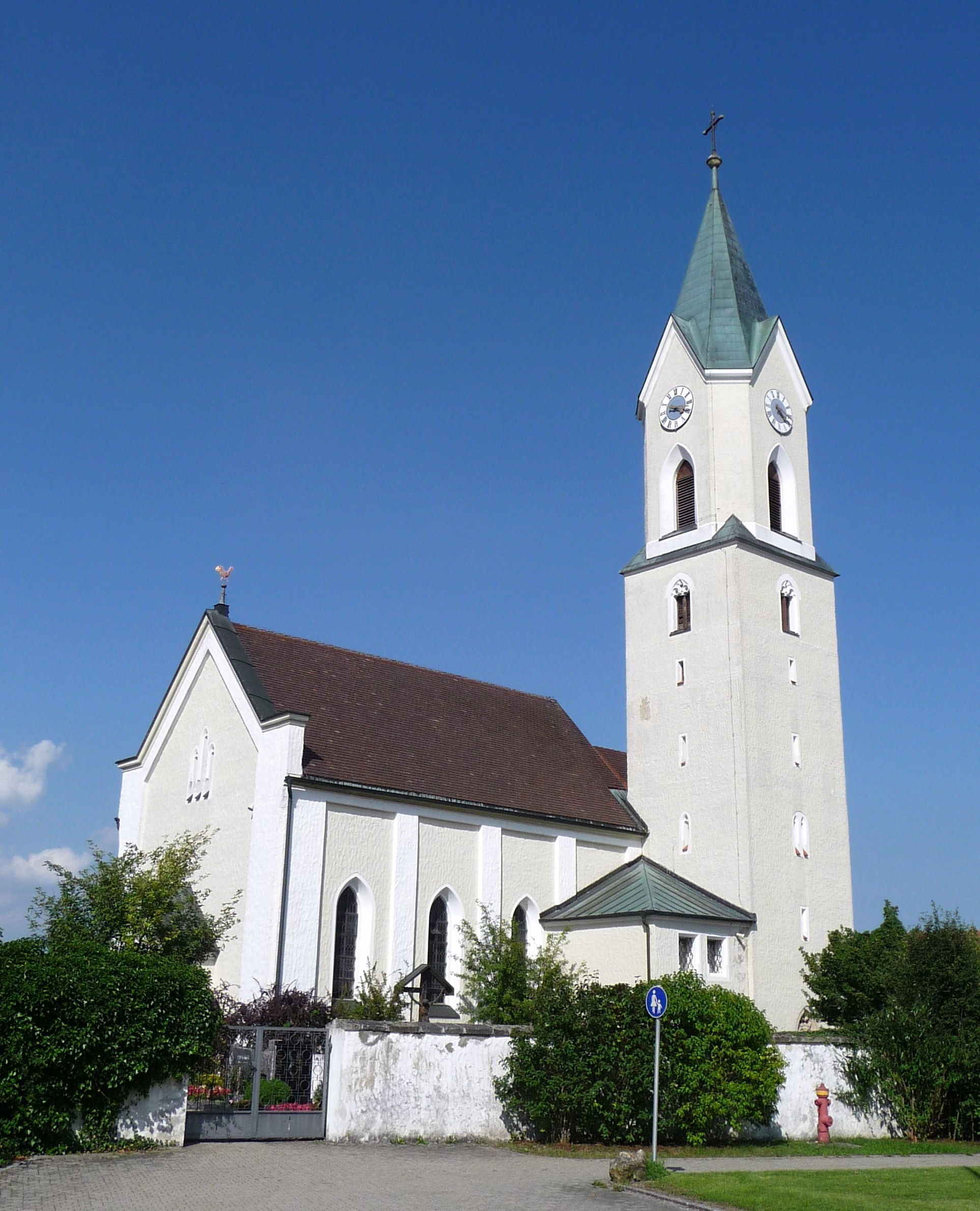 Die Pfarrkirche St. Lucas in Aholfing